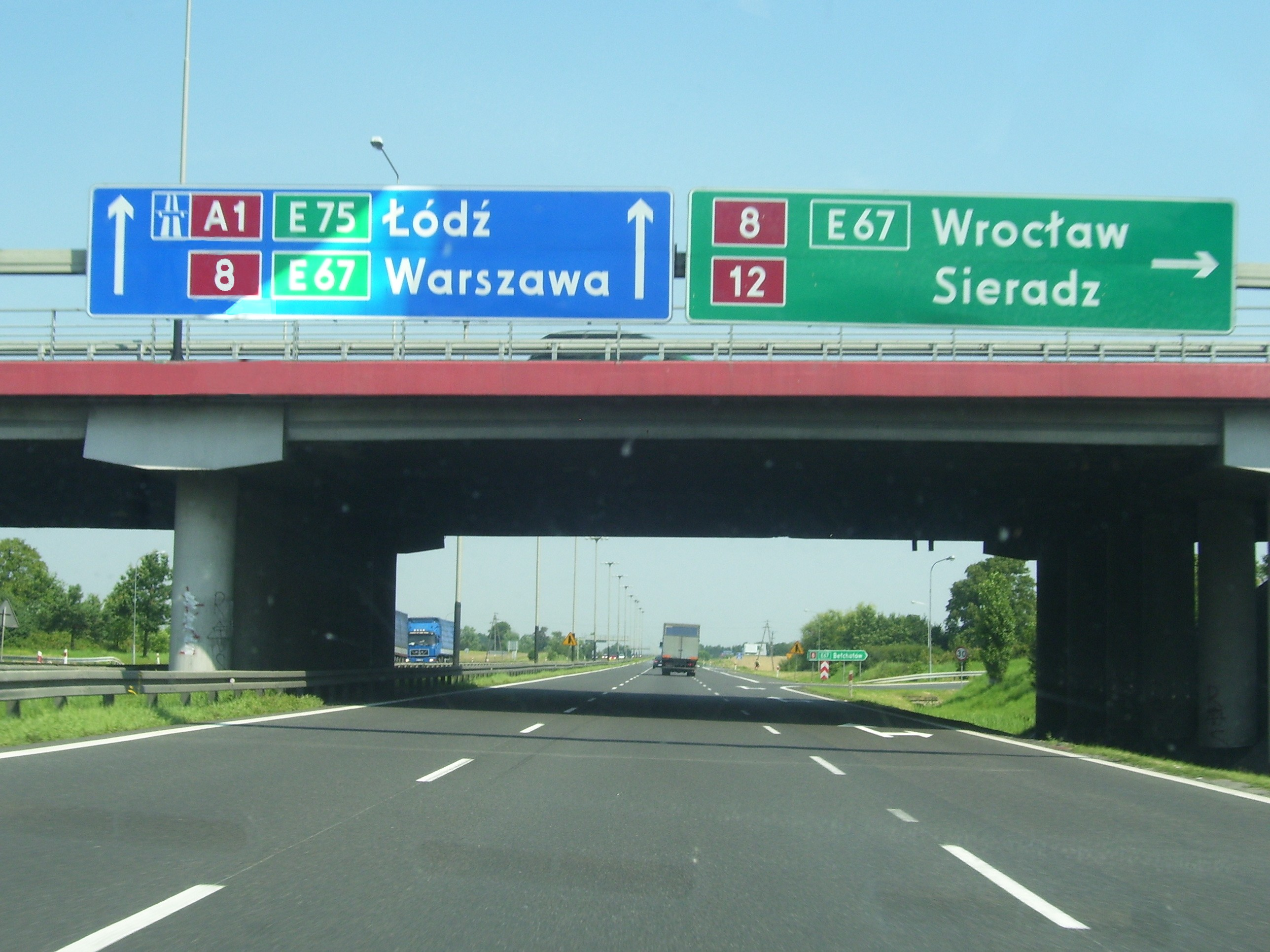 A1&DK8